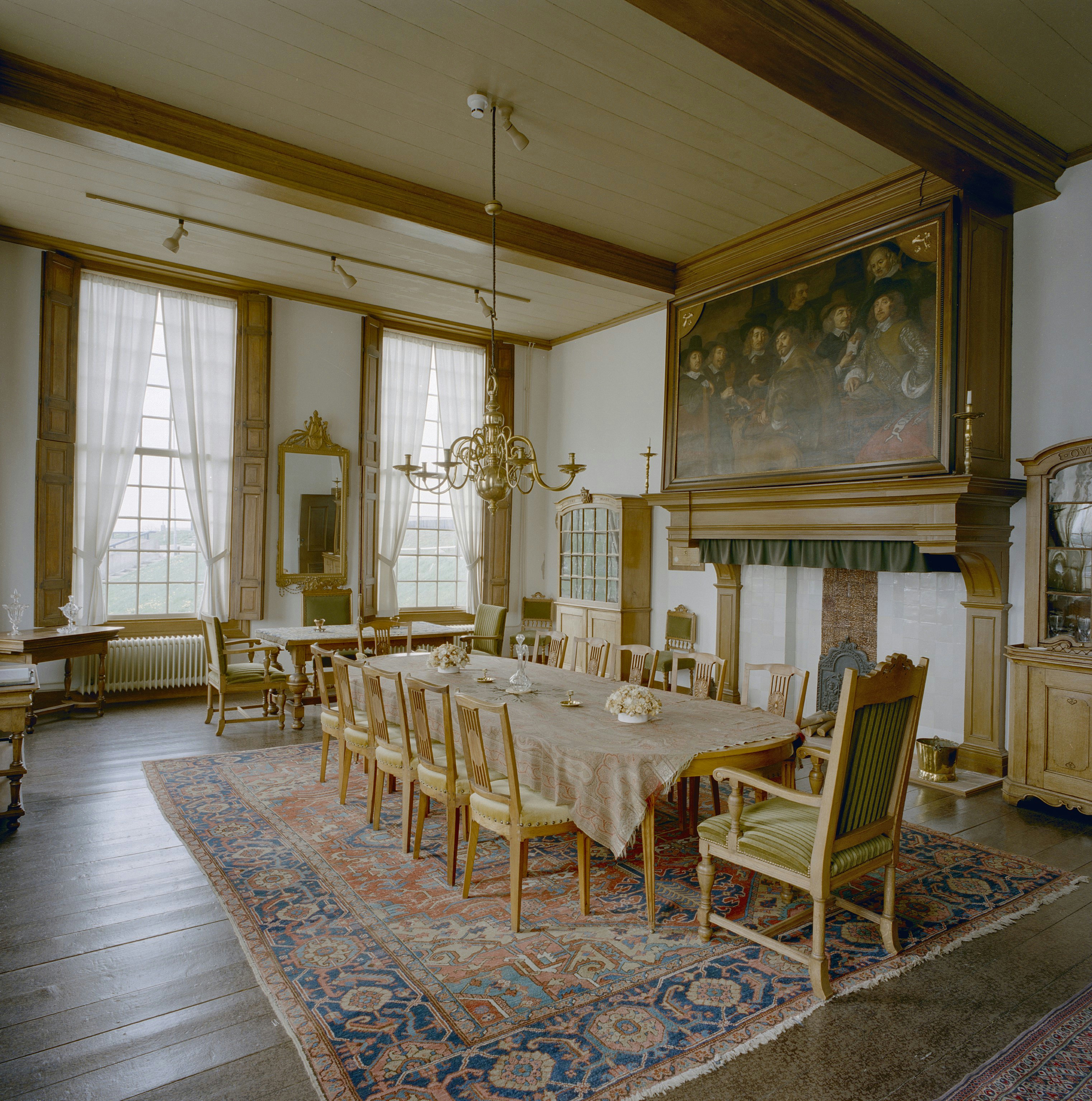 Gemeenlandshuis van de Overwaard: Interieur, overzicht vergaderkamer (opmerking: Gefotografeerd voor plaatsing op de Werelderfgoedlijst)